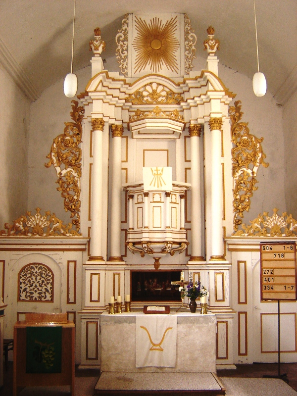 Altar der Pfarrkirche in Leitzkau (Sachsen-Anhalt)